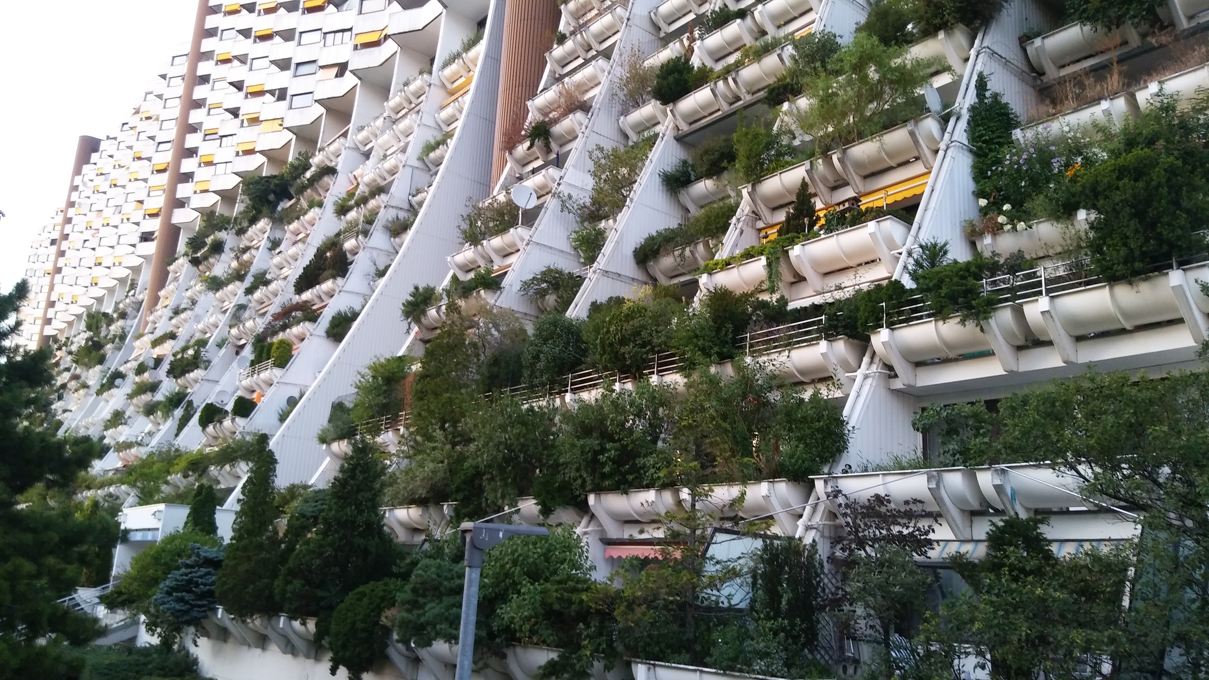 Alterlaa, niezwykłe osiedle mieszkaniowe w południowej części Wiednia